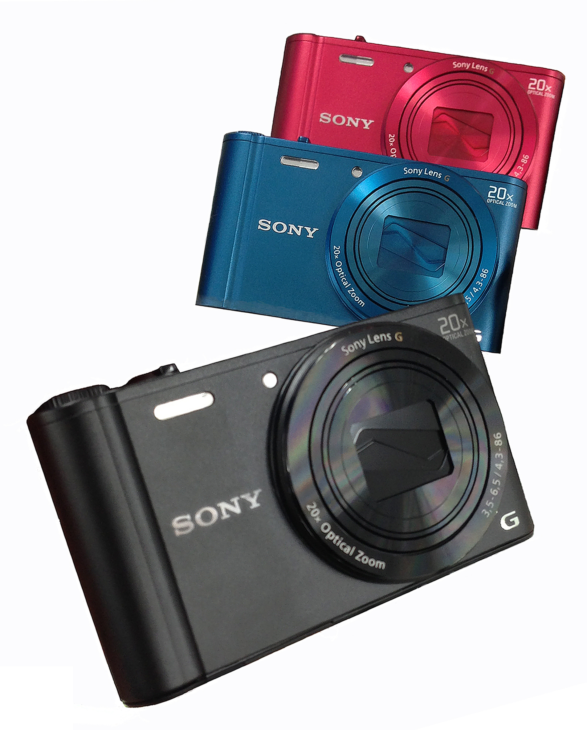 Sony Cyber-shot DSC-WX300 in verschillende kleuren. Kijk ook eens op de weblog van de auteur.